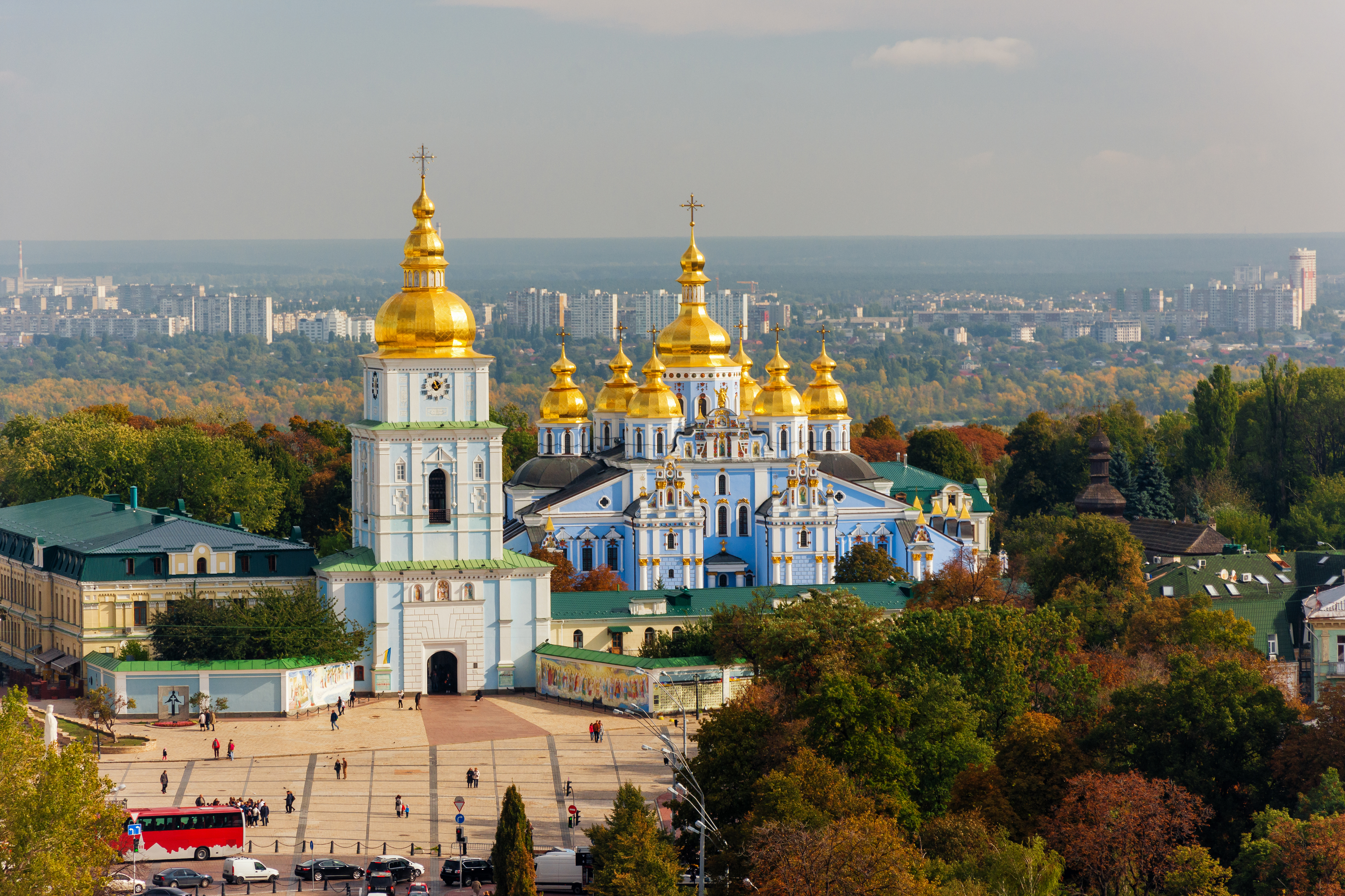 Комплекс споруд Михайлівського Золотоверхого монастиря, Київ, вул. Трьохсвятительська, 4–8